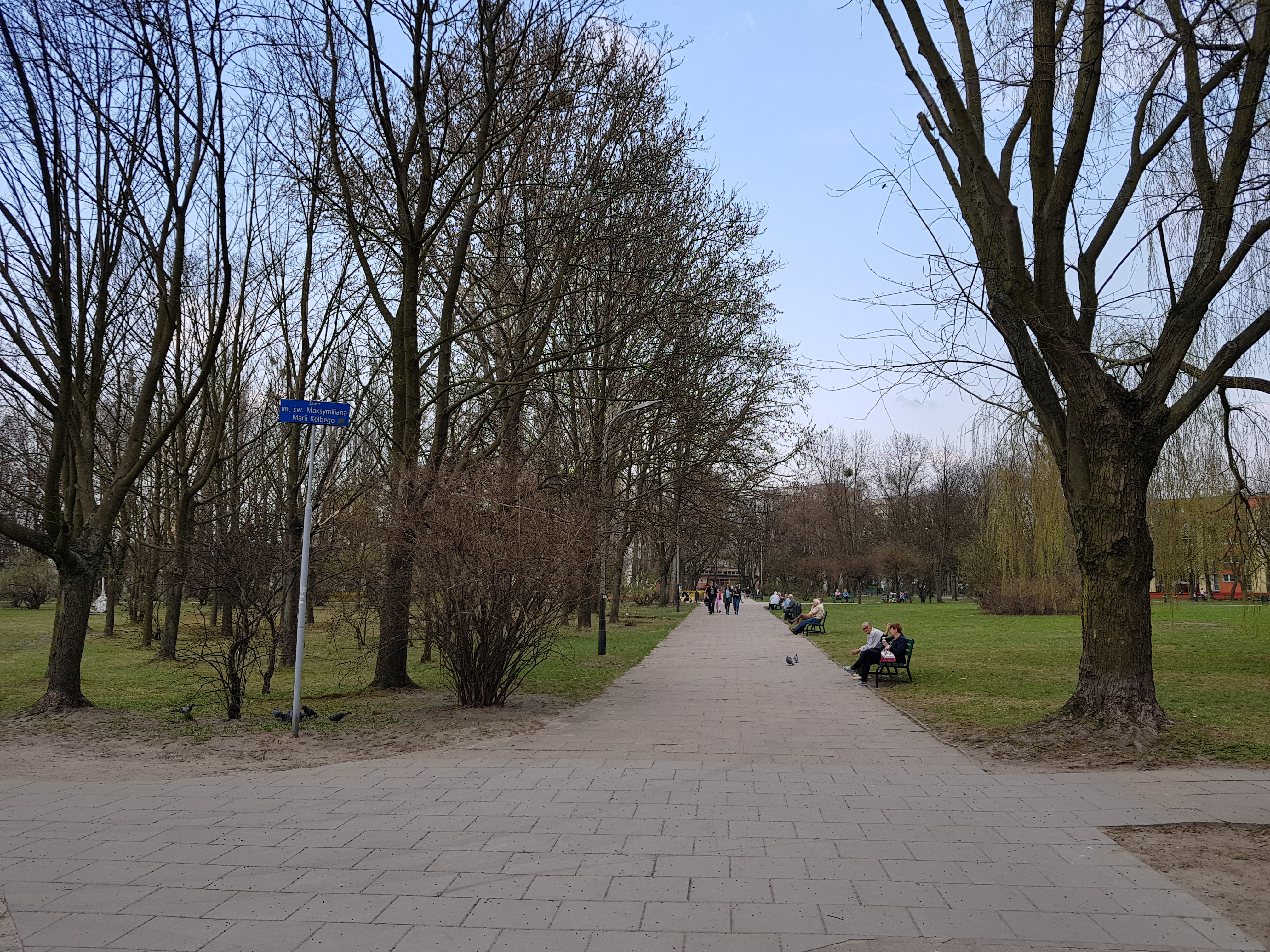 Skwer im. Świętego Maksymiliana Marii Kolbego, dawniej Park przy ulicy Gabrieli Zapolskiej – obszar zieleni miejskiej położony w Łodzi w dzielnicy Górnapomiędzy ulicami Tatrzańska i Lucjana Rydla.